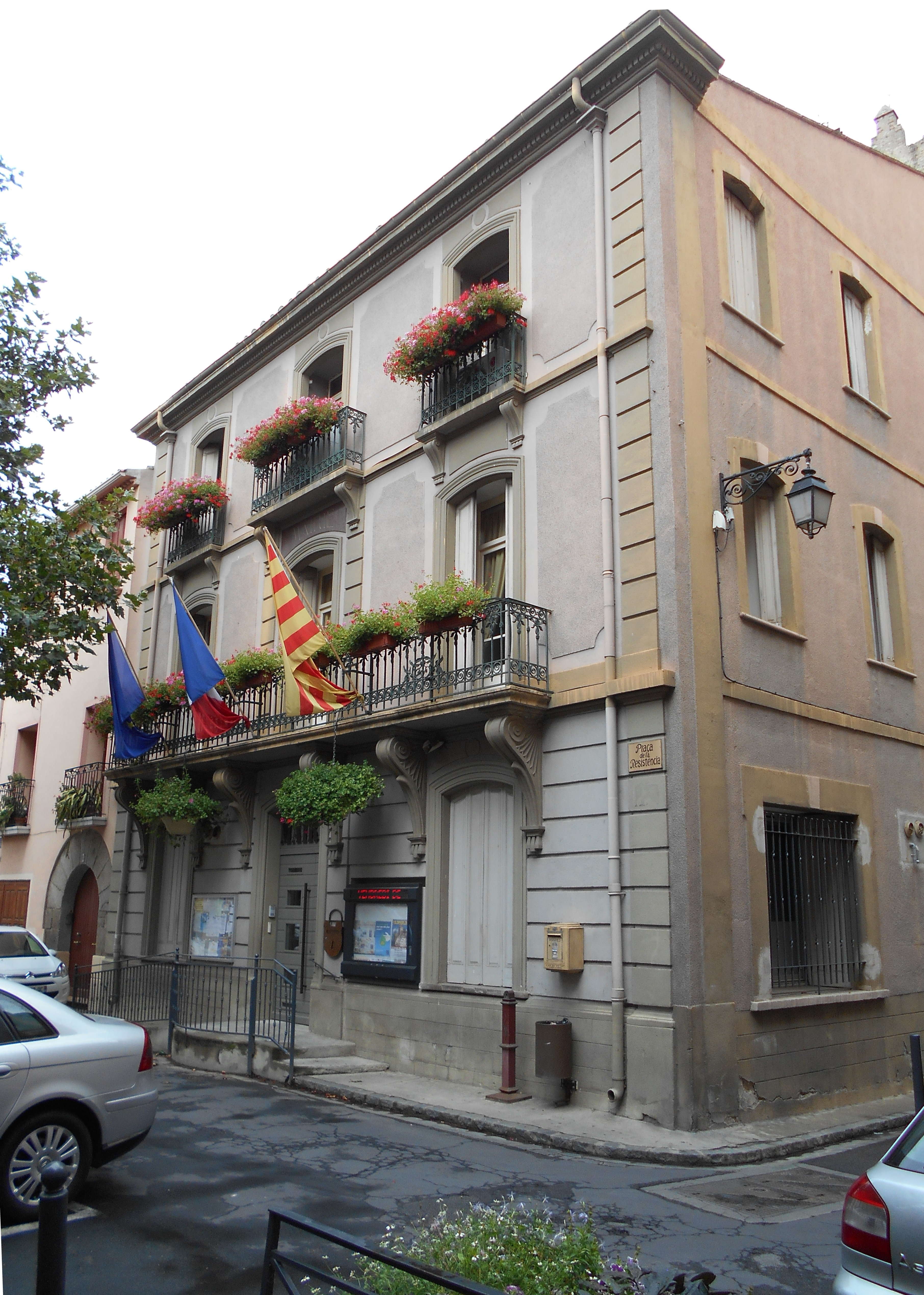 La Casa del Comú d'Illa